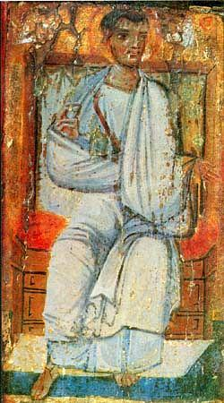 Thaddeus of Edessa. (Thaddeus of the Seventy Disciples). Encaustic painting. Fragment of "Agar receivinh the Mandilion from Thaddeus". Фаддей, апостол из 70-ти. Энкаустическая икона. Верхняя часть левой створки триптиха с утраченным средником. Часть композиции «Авгарь получает Нерукотворный Образ от апостола Фаддея».